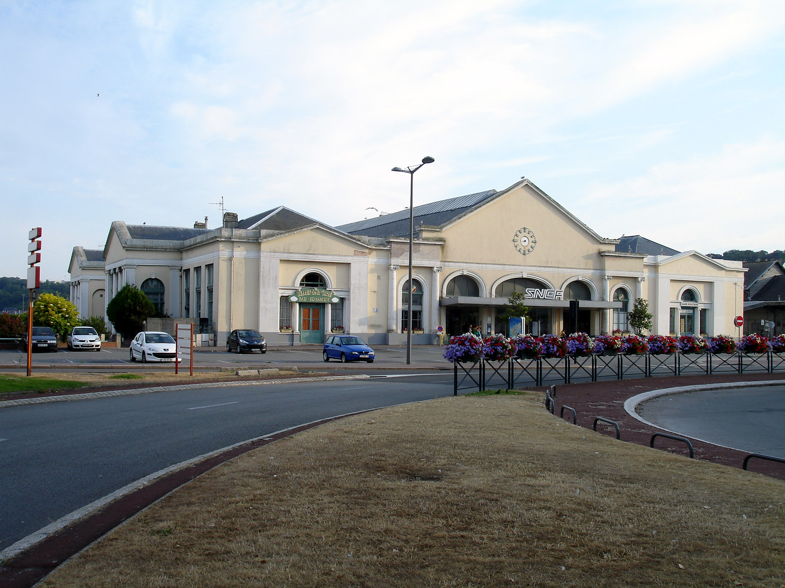 La gare de Dieppe, Seine-Maritime, France.